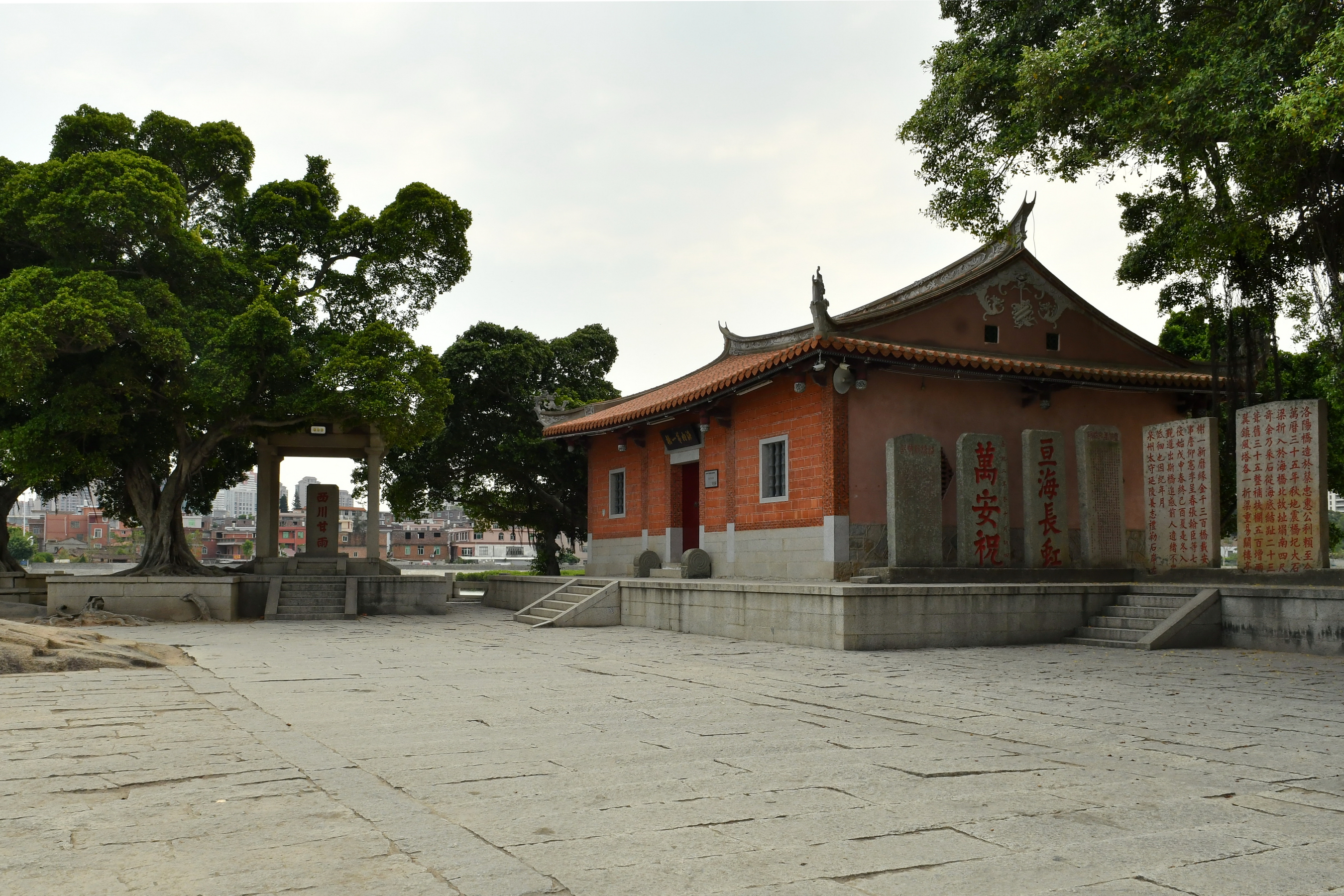 洛阳桥中部中州岛上的祠堂与碑刻